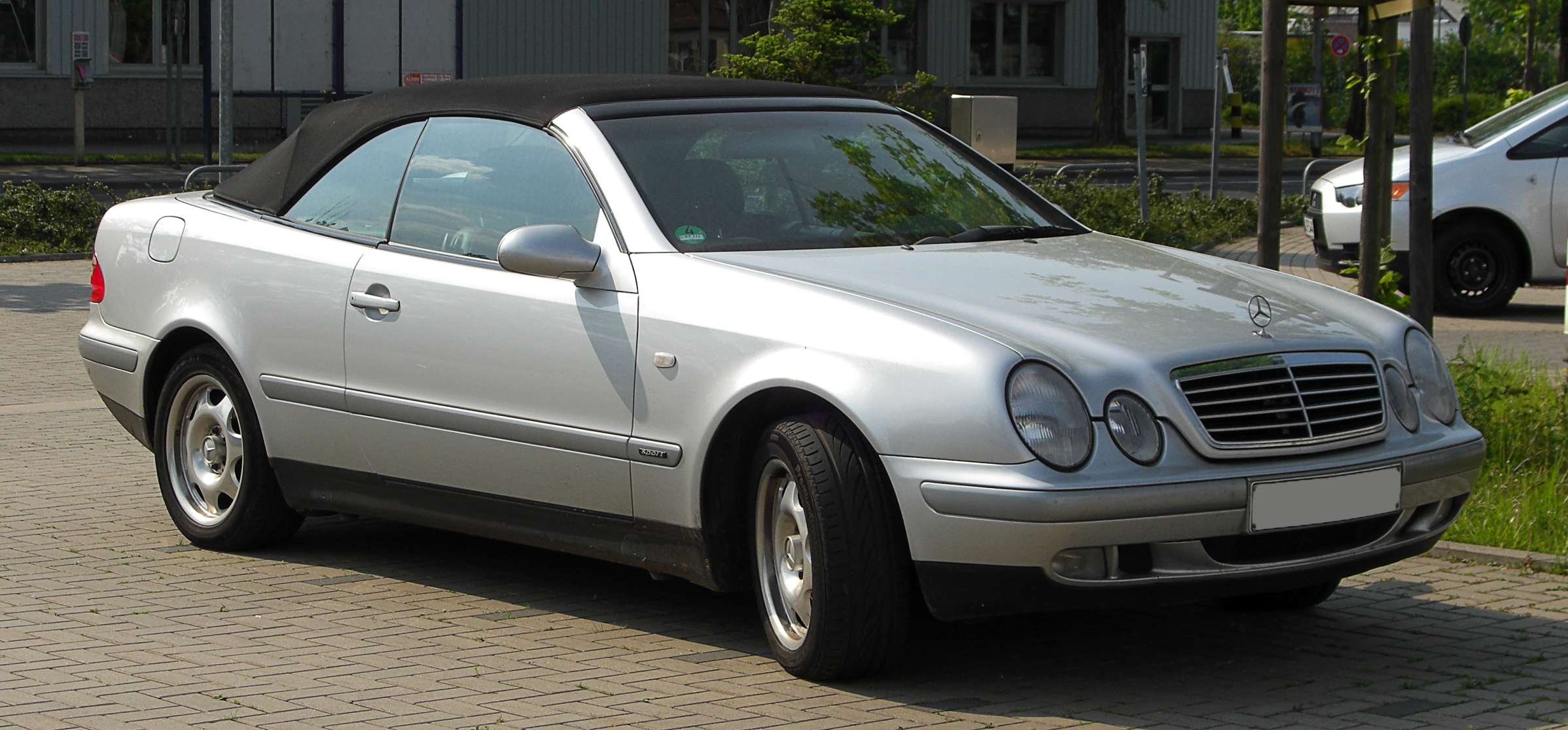 Mercedes-Benz CLK 200 Cabriolet Sport (A 208)